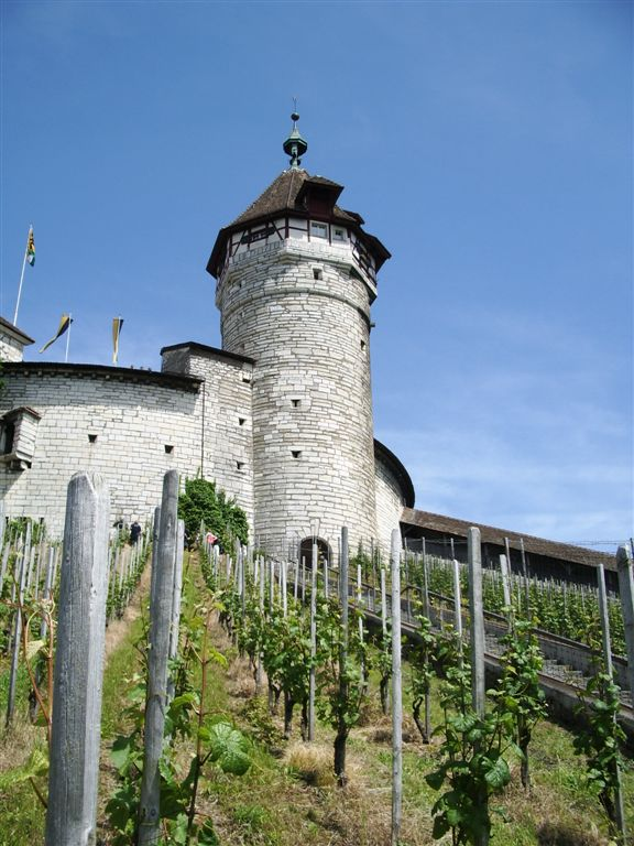 Munot mit Rebberg Bild im Juni 2006 selbst gemacht.